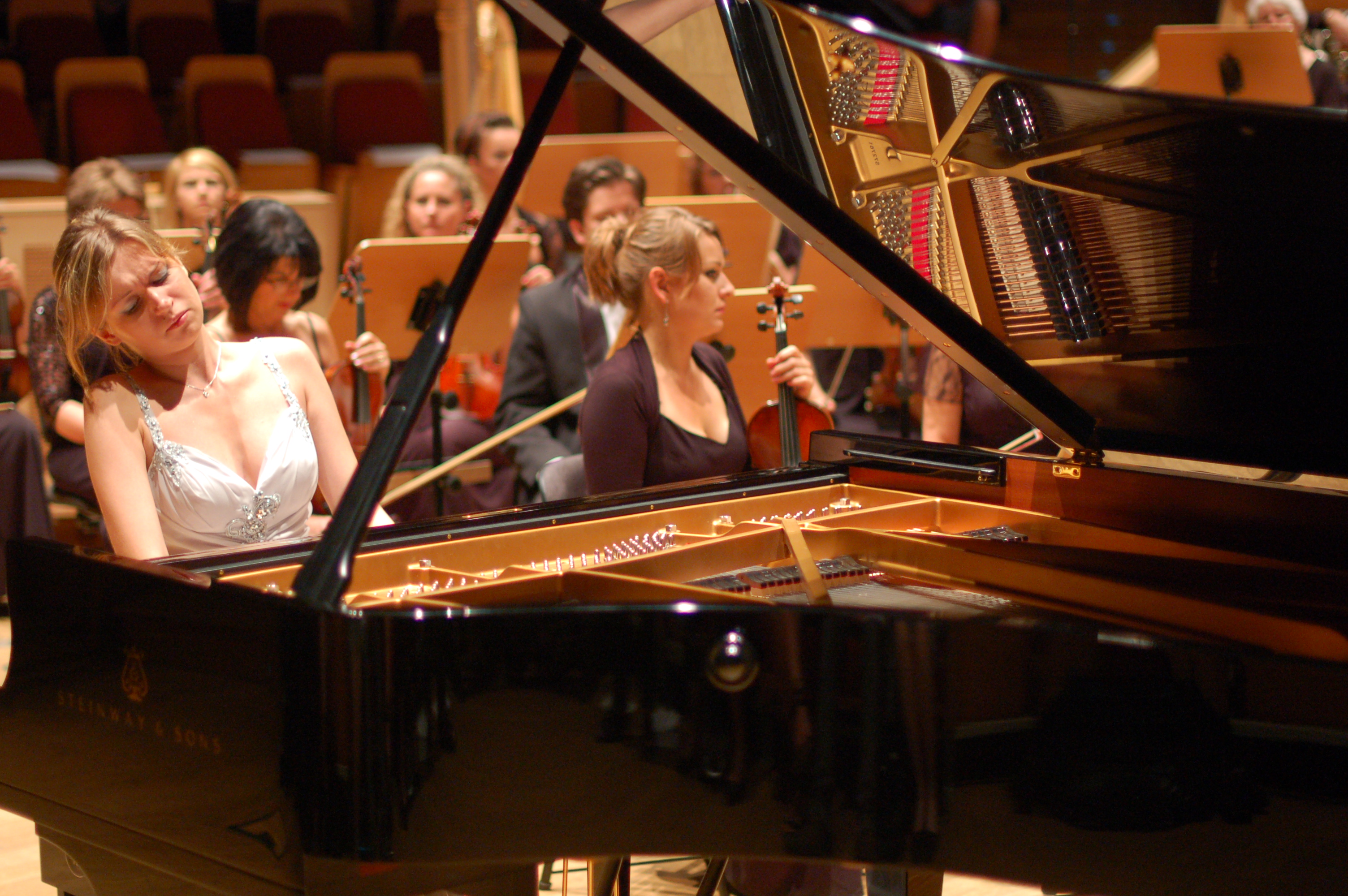 Wikimania Gdansk 2010; Kateryna Tereshchenko, Pianistin